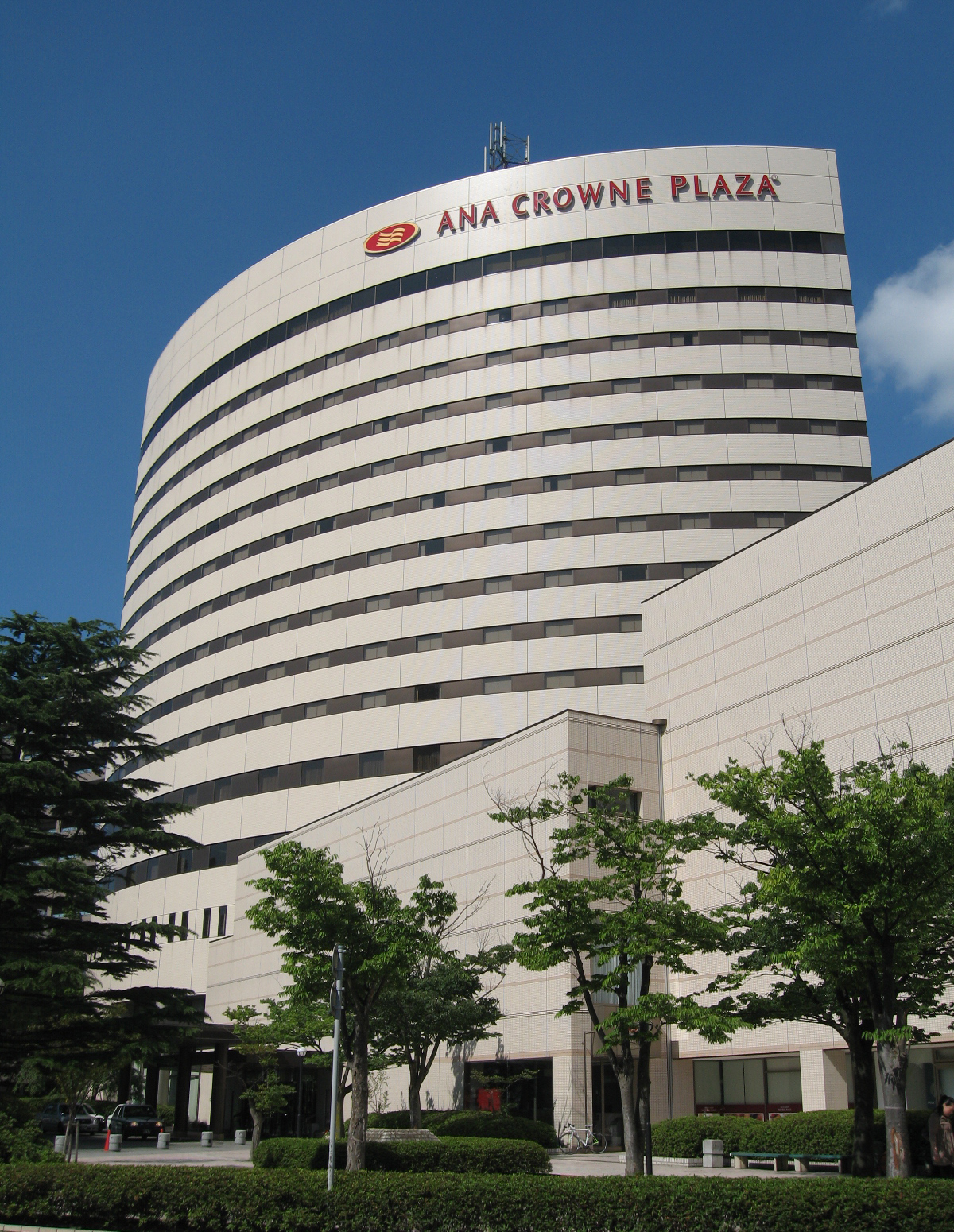 新潟県新潟市中央区。ANAクラウンプラザの画像。